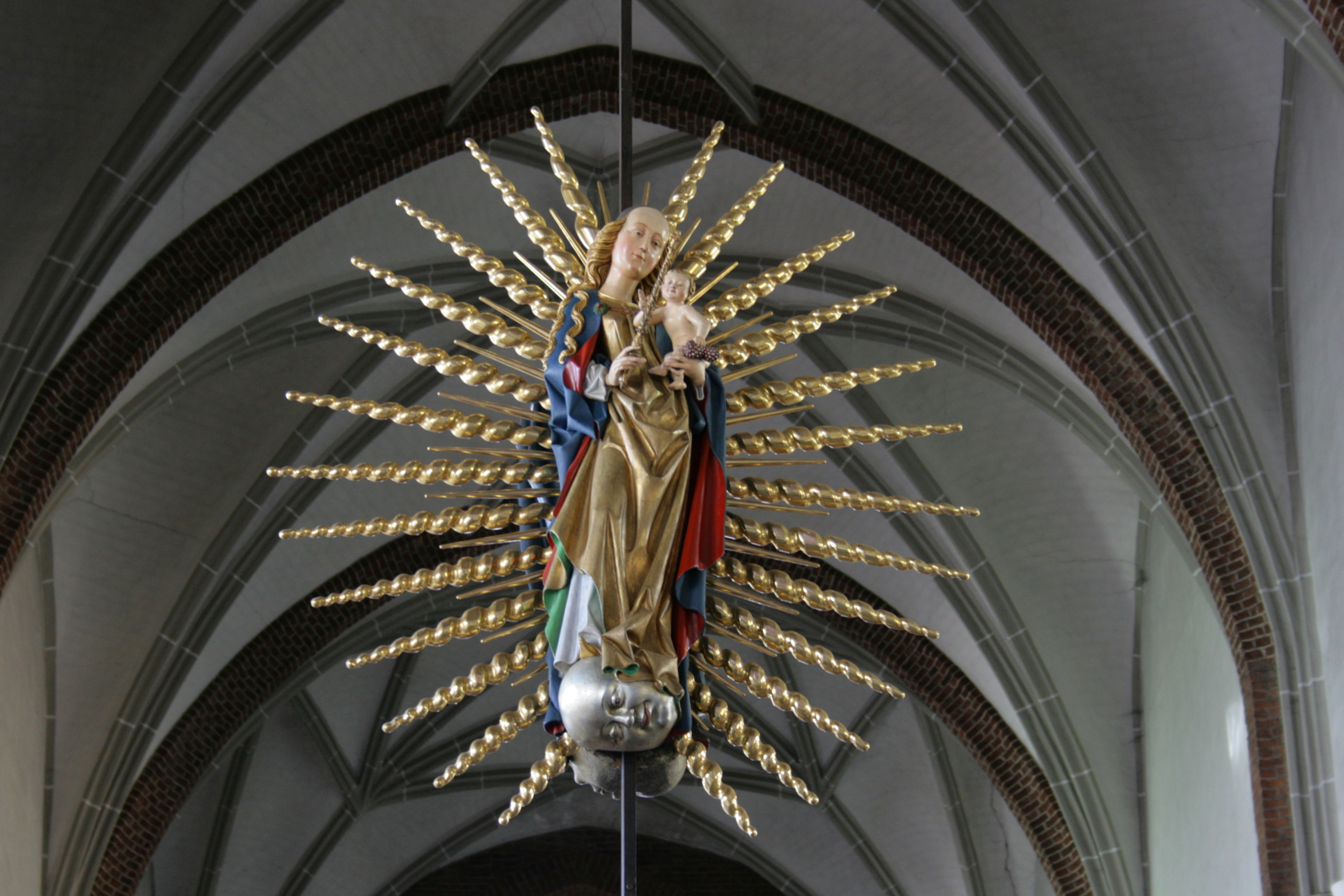 Sankt Aldegundis in Emmerich am Rhein